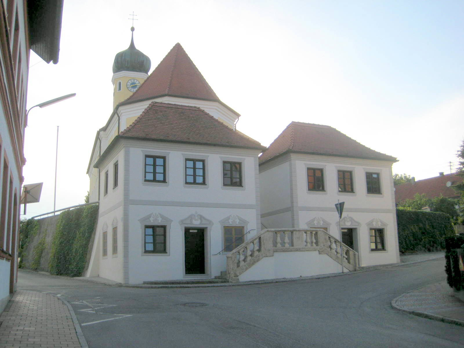 Die zwei Bruderschaftshäuschen wurden im Barock neu erbaut.